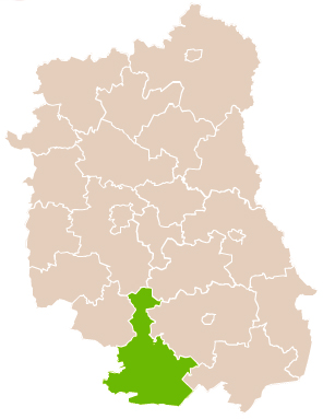 Map of Biłgoraj county, Lublin voivodship Mapa powiatu biłgorajskiego, województwo lubelskie